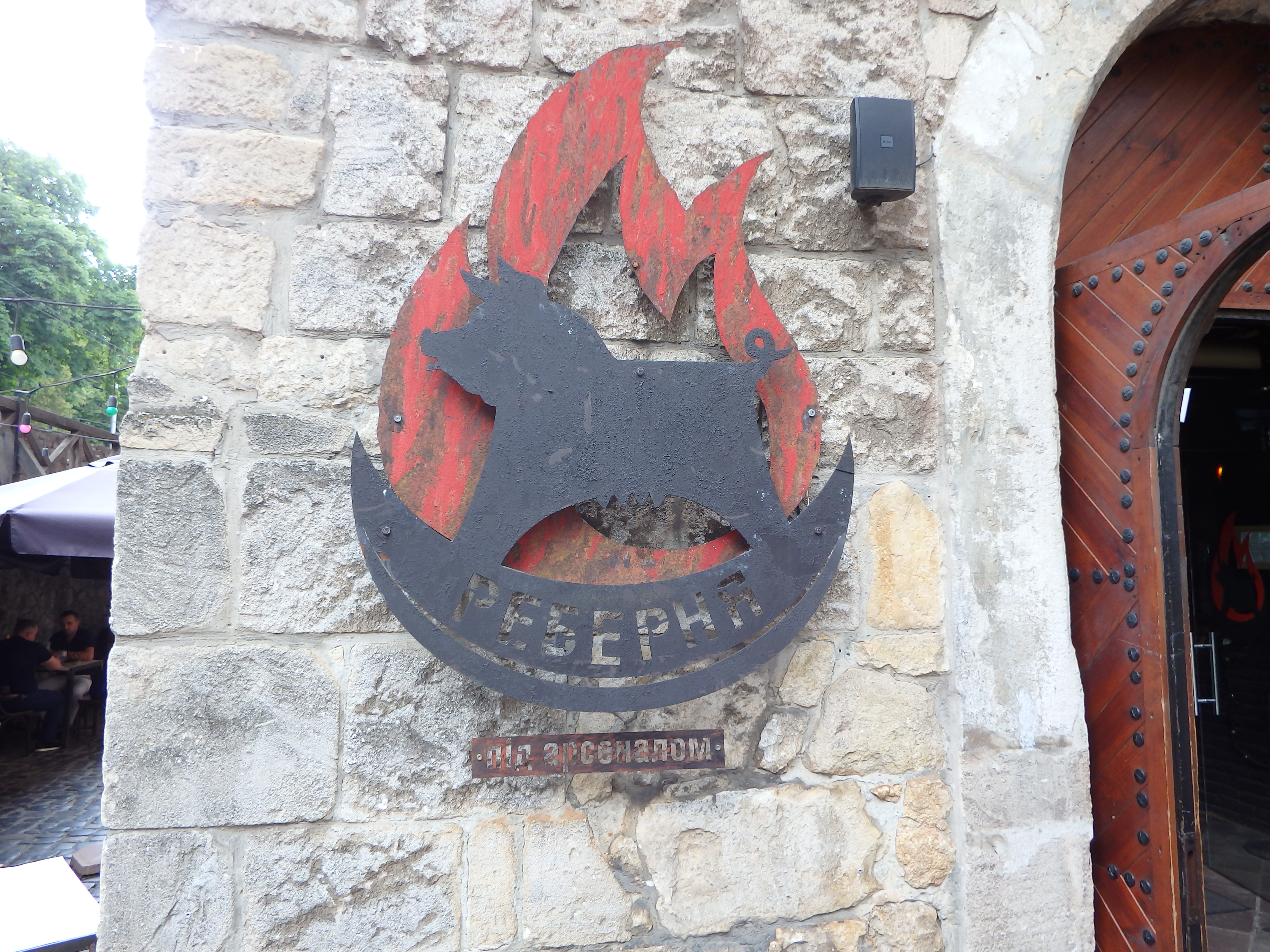 Емблема Реберні «Під Арсеналом»